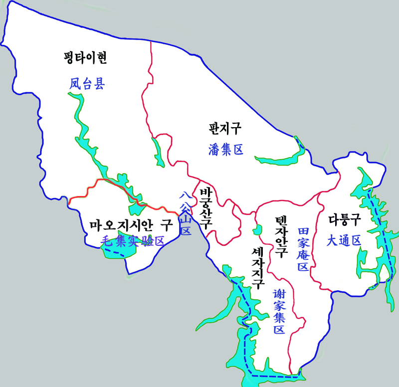 화이난 행정지도